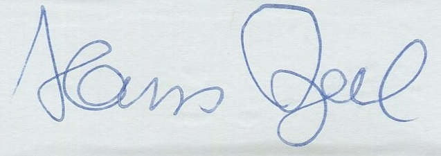 Autogramm Hans Apel